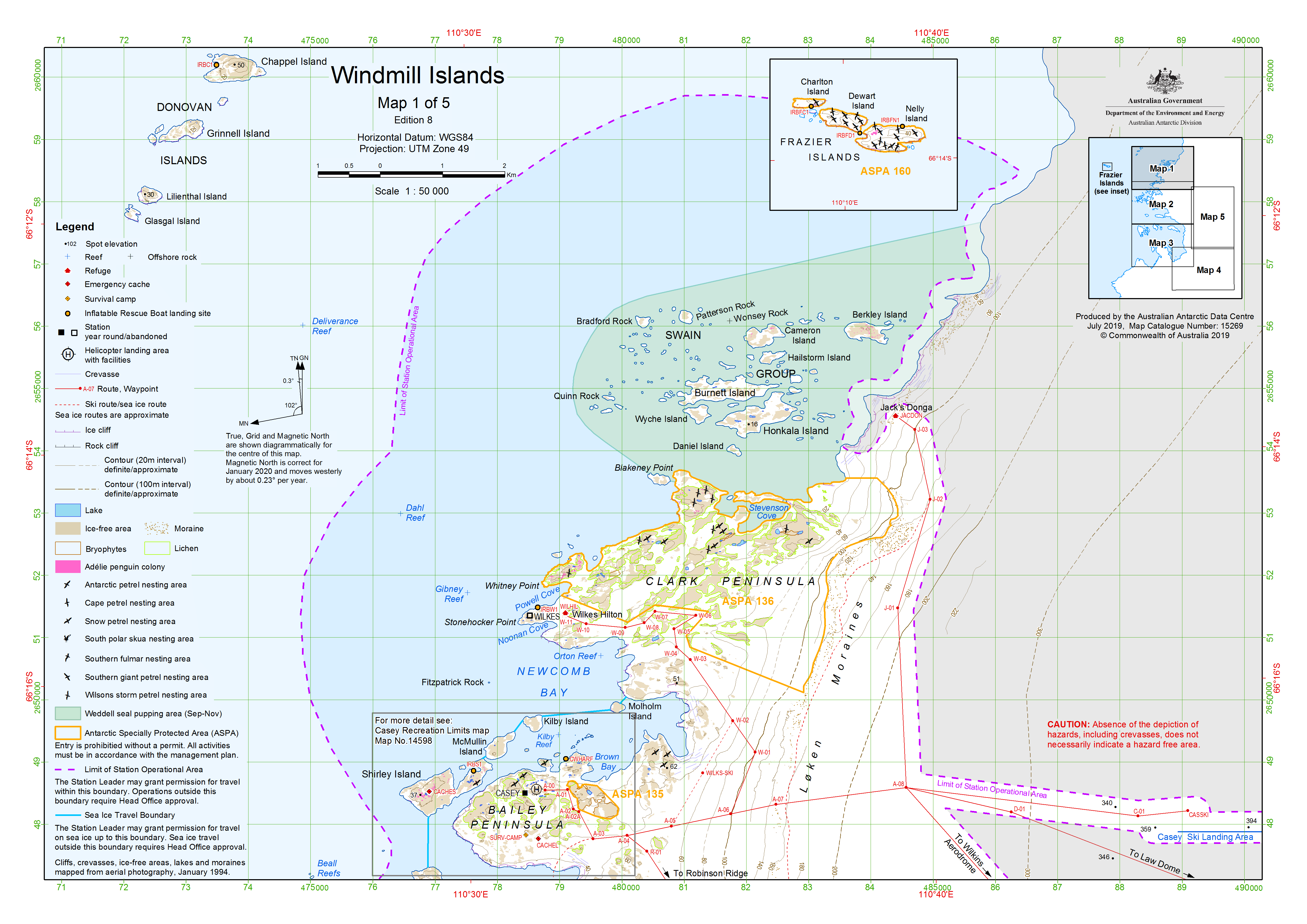 Lage und Erstreckung der nördlichen Windmill-Inseln